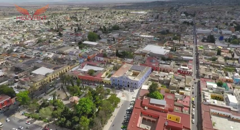 vista aérea de Huamantla